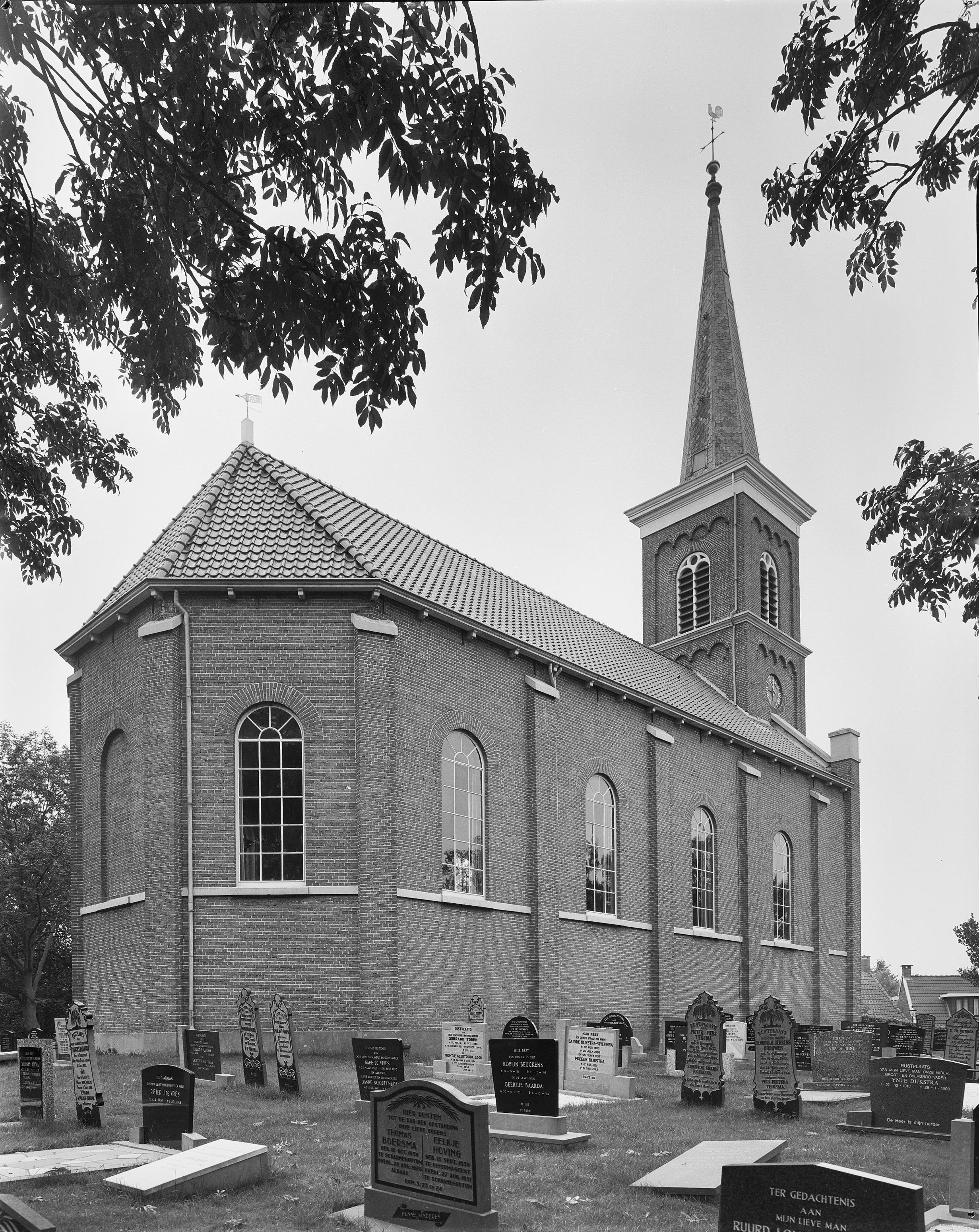 Nederlands Hervormde Kerk: Exterieur NOORDGEVEL